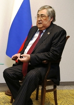 Губернатор Кемеровской области Аман Гумирович Тулеев